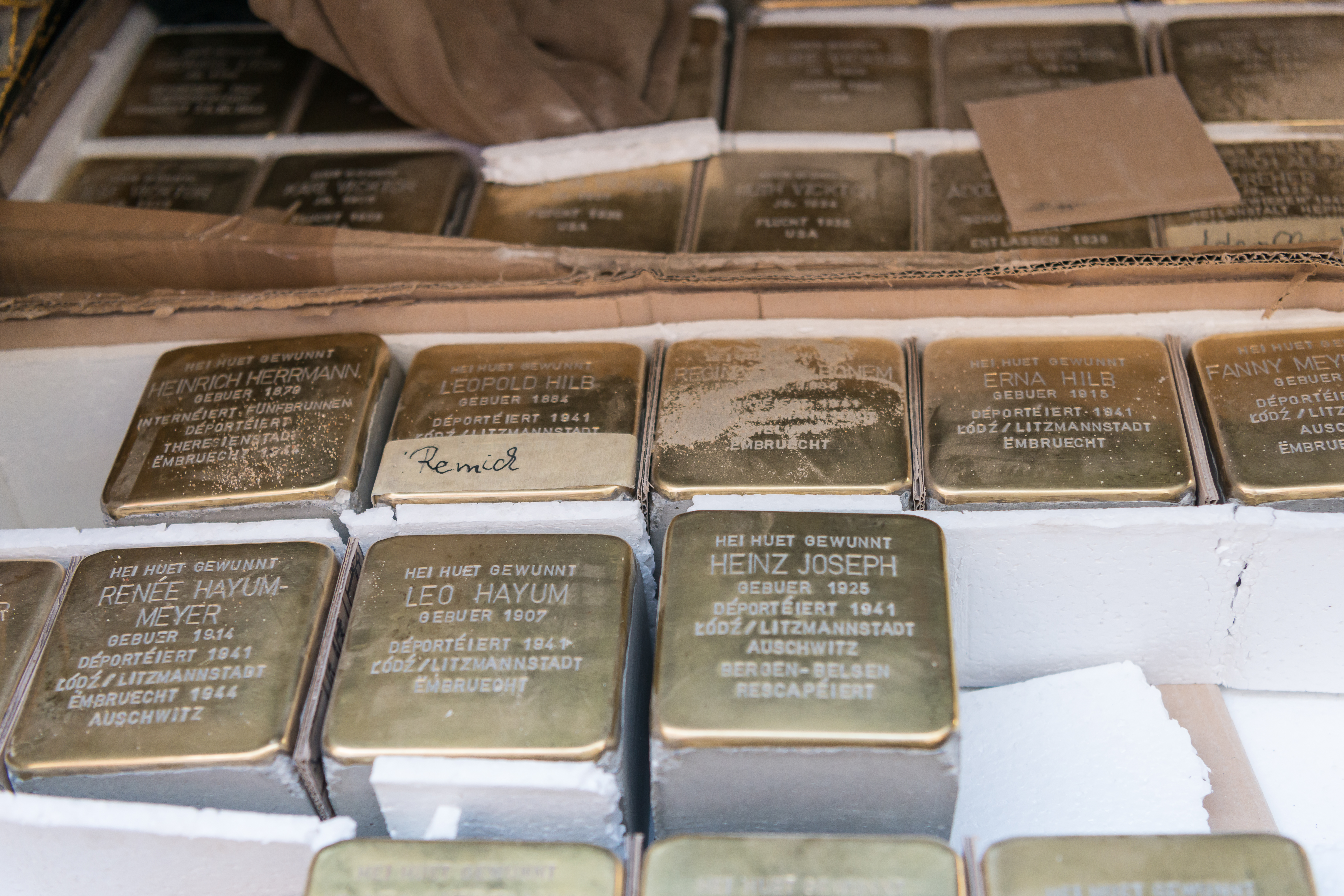 Vrum Krich hunn zu Réimech fënnef jüddesch Famille gewunnt. Dräizeng Mënsche vun hinne goufen ëmbruecht, nëmme fënnef hunn den Holocaust iwwerlieft - alleguerte ware si Affer deene bis dohi vun offizieller Säit net geduecht gouf. Dofir huet d'Stad Réimech als ofschléissend Aktioun am Kader vu "Mémoires communes - verfollegt, verdrängt, vergiess" de 24. Juni 2016 fir déi Doudeg siwwenzéng Stolpersteng vum däitsche Kënschtler Gunter Demnig verleeë gelooss. D'Stad Réimech, de Buergermeeschter Henri Kox, d'Membere vum Schäffen- a Gemengerot an aacht Lokalassociatiounen hunn de Parrainage vun dëse Steng iwwerholl. Den nämmlechten Dag huet d'Gemeng an Zesummenaarbecht mat der asbl MemoShoah Lëtzebuerg eng Plaz fir d'Affer vun der Shoah ageweit. Domat ass Réimech déi éischt Uertschaft am Land déi sou ausdrécklech hir fréier jüddesch Awunner éiert. Dem Gunter Demnig säi Stock am Neiewee. D'Famill Marx-Nathan war an drëtter Generatioun zu Réimech an huet hei op Nr 36 am Neiewee gewunnt. De Felix Marx, 1875 zu Schwéidsbeng gebuer, war Véihändler a Versécherungsagent. Den 23. Abrëll 1942 gouf hien, zesumme mat senger Fra Emma, 1878 zu Gau-Algesheim an Däitschland gebuer, op Lublin an de Ghetto Izbica deportéiert. Béid goufen do, oder zu Bełżec oder Sobibor ëmbruecht. De Gaston, hire Jong war am Mee 1940, beim preiseschen Iwwerfall op Lëtzebuerg, a Frankräich geflücht an huet als eenzege vun hinnen den Holocaust iwwerlieft.